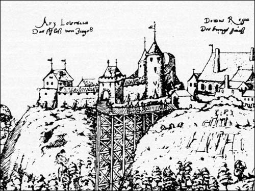 Stary Zamek w Grodnie na fragmencie widoku miasta z 1597 r.